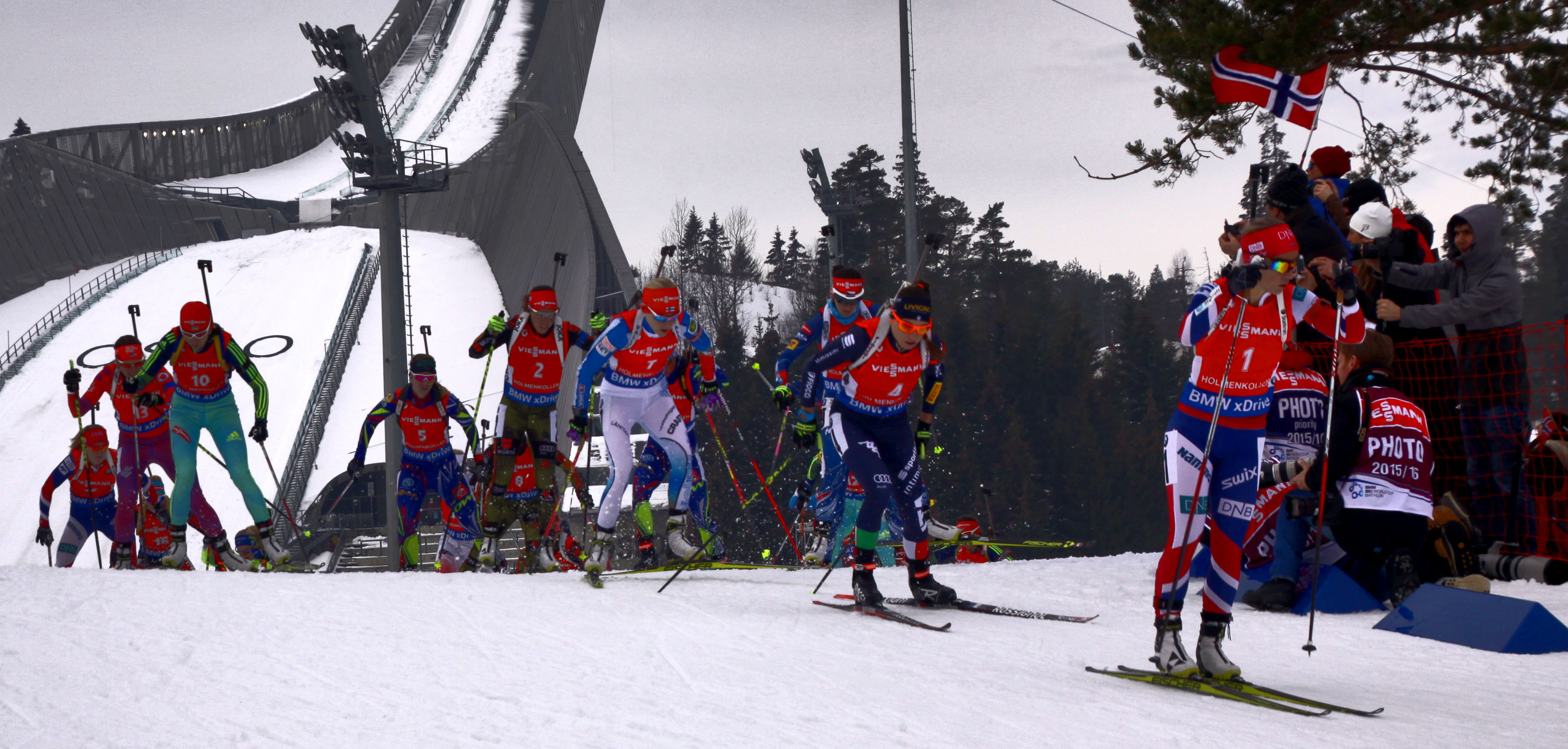 Oslo. Aux championnats du monde de biathlon.